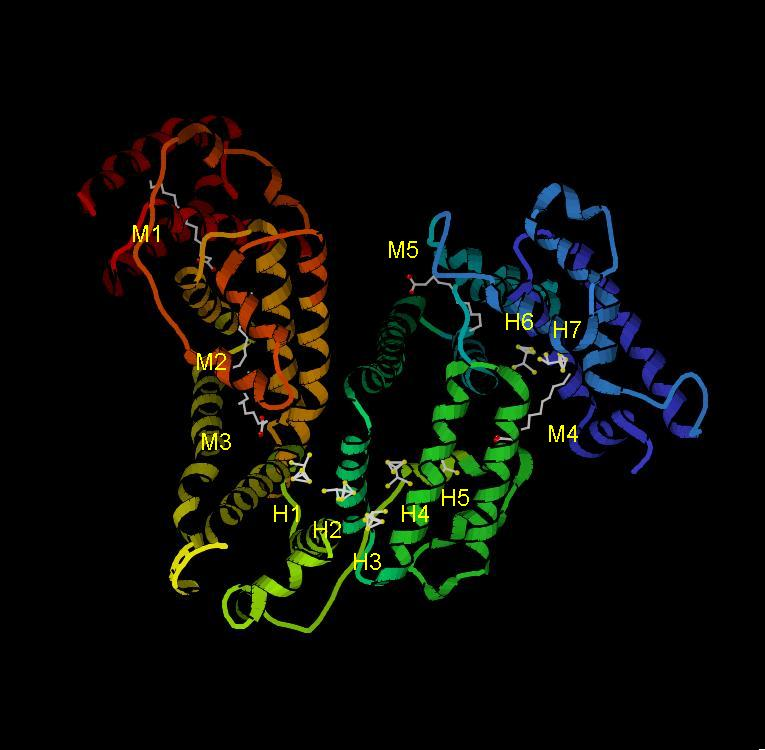 Albüminin miristik asit ve genel anestetik halotan bağlanmış hali. H1-H7, halotan; M1-M5, miristik asit. Protein Databank'da 1E7C [1] kayıtlı koordinatların KiNG görüntüleyicisi ile elde edilmiş resmidir.